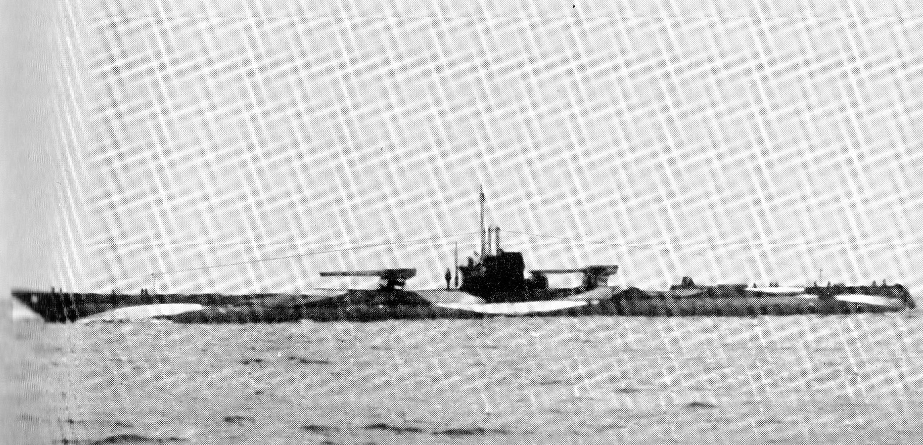 U 152 Kiel auslaufend 5. September 1918